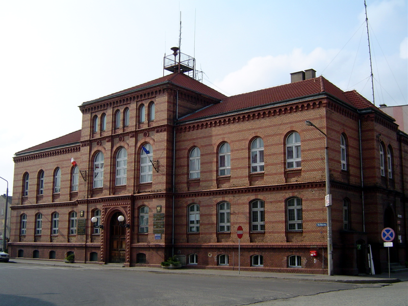 Rzepin - ratusz miejski, wzniesiony w 1833 roku, znacznie zniszczony podczas wojny, odbudowany w latach 1950-60, 05.2004.